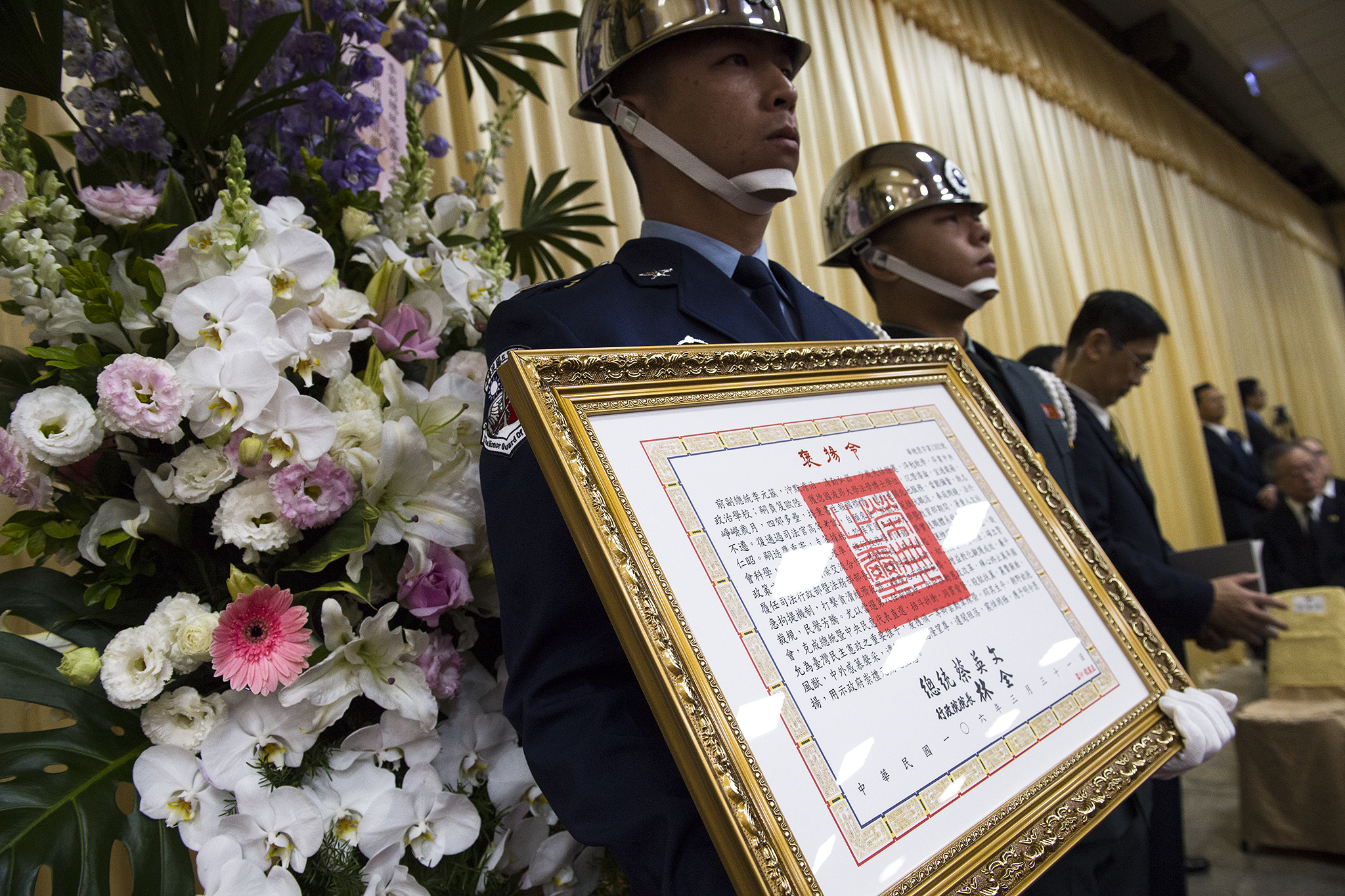 中文（台灣）: 中華民國前副總統李元簇追思祝福會，空軍儀隊弟兄手捧總統蔡英文頒給李元簇的褒揚令。